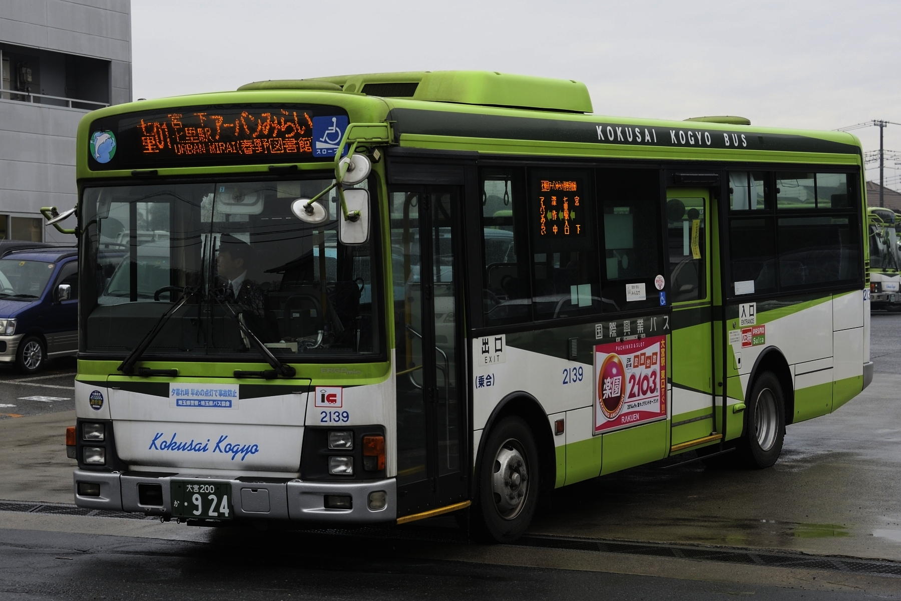 国際興業バス2139号車